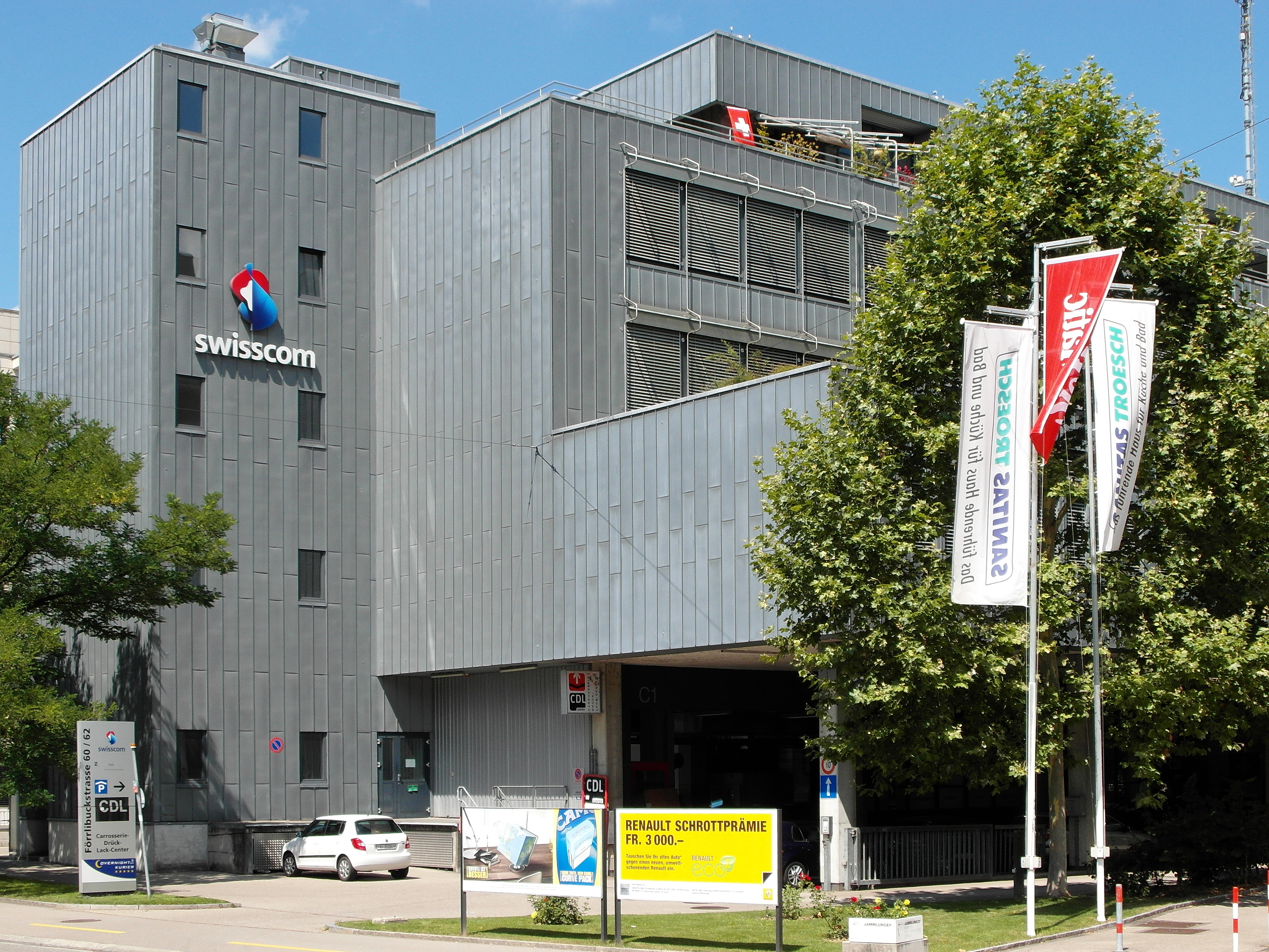 Förrlibuckstrasse, Zürich-Industriequartier (Switzerland)